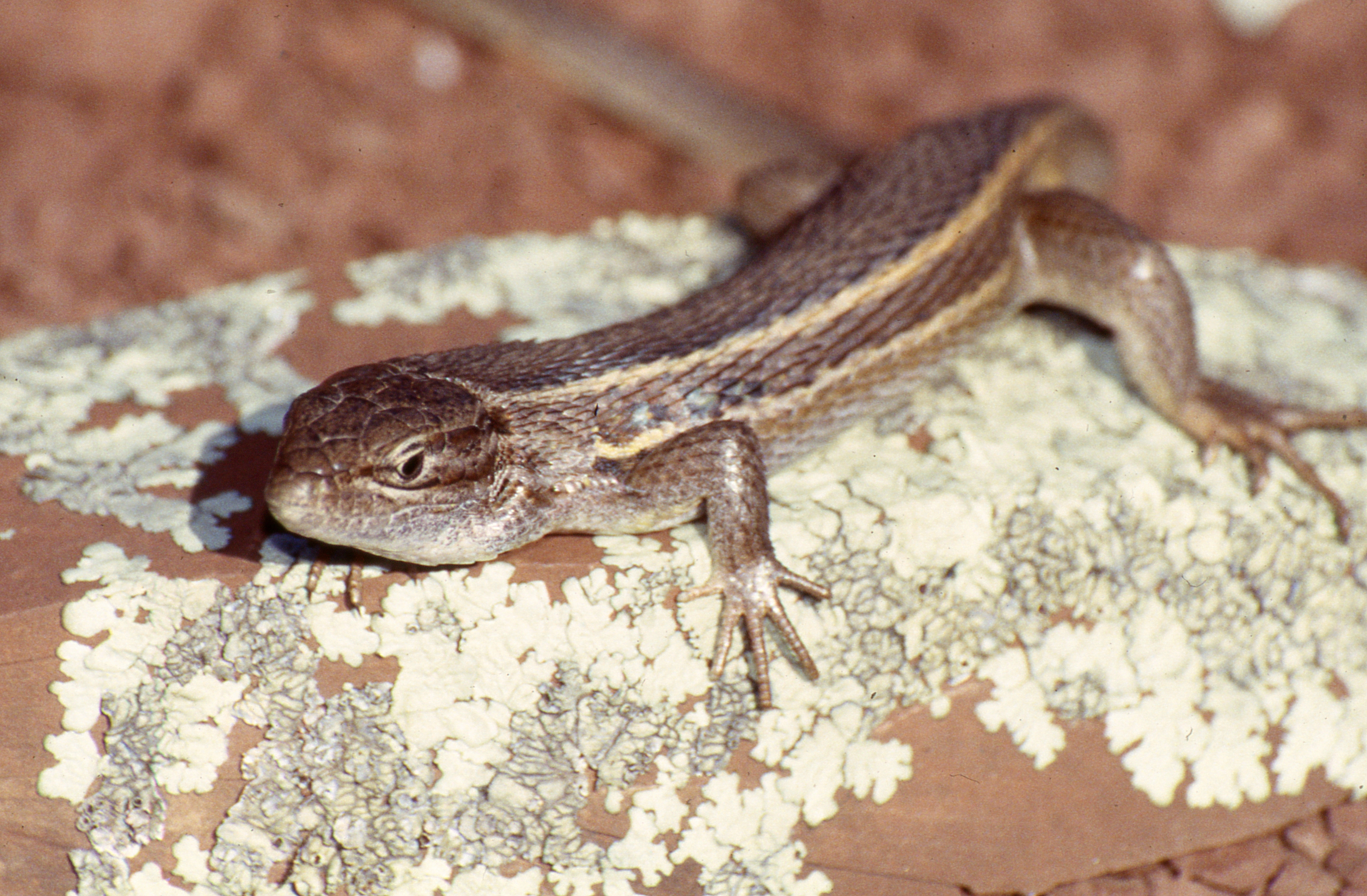 Lac du Salagou, Octon , Hérault, FRANCE Scanned Slide from May 2001